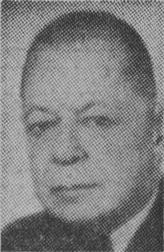 Arkitekten Gösta Hedström